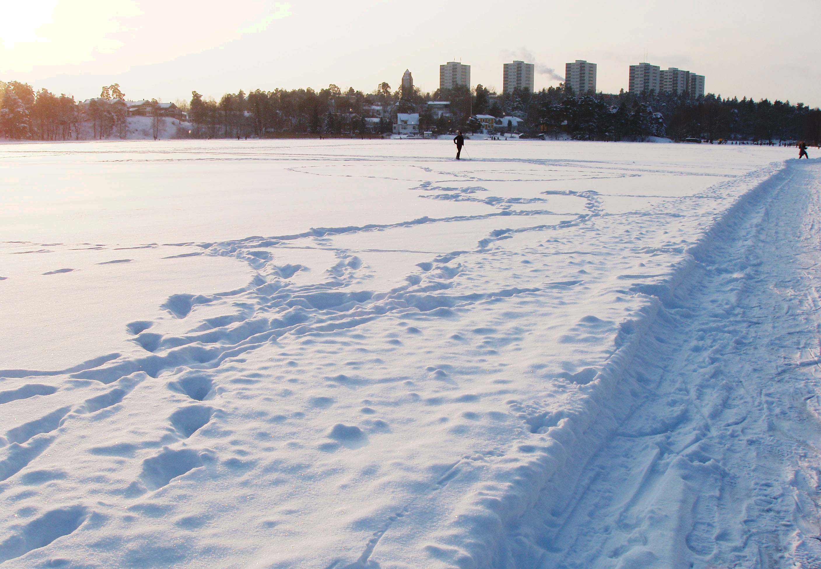 Kottlasjön på Lidingö med höghusen vid Skärsätra i bakgrunden.